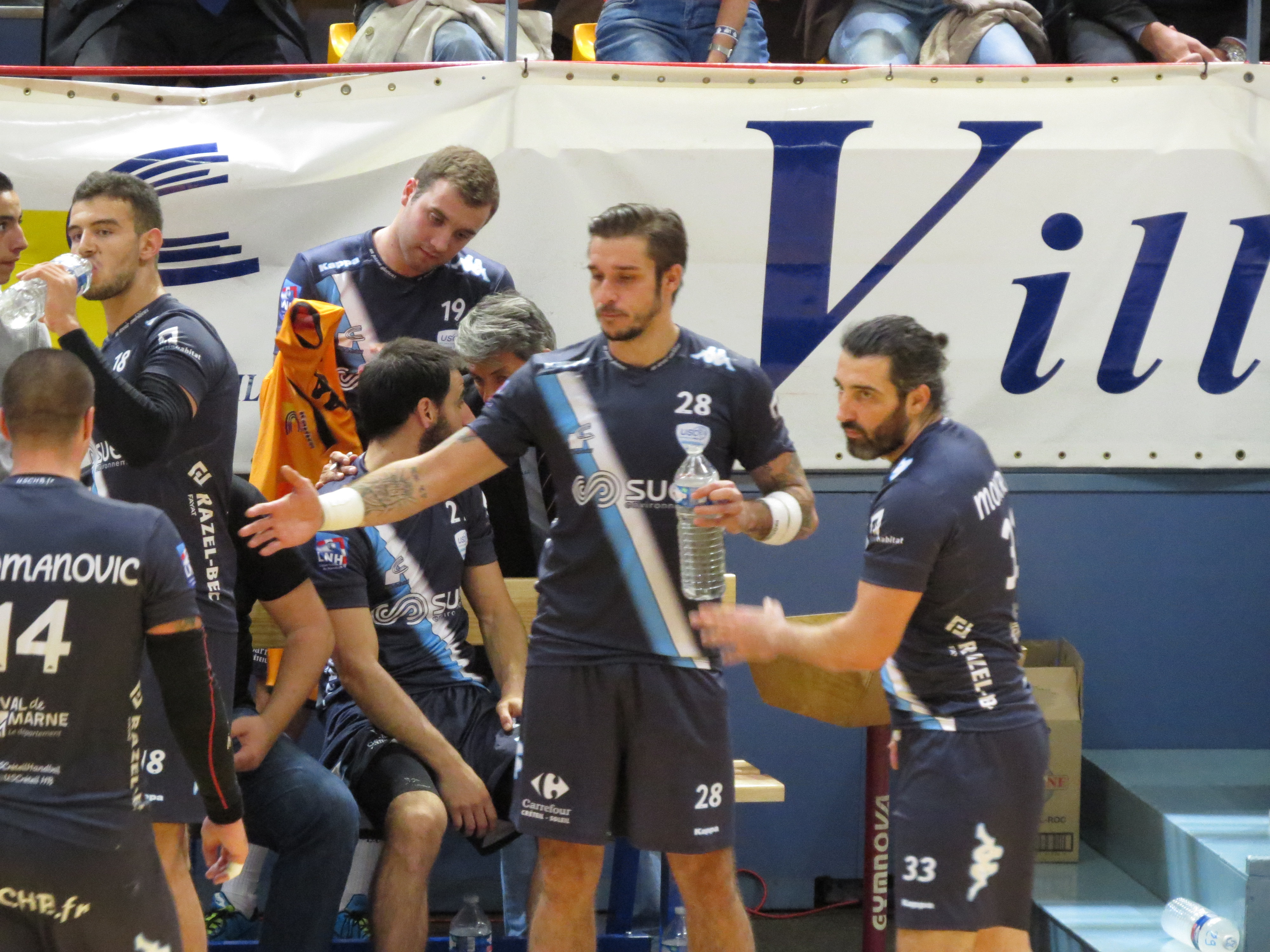 US Créteil vs Chambéry en LNH le 9 septembre 2015 28 : Alexandru Csepreghi 33 : Mohamed Mokrani